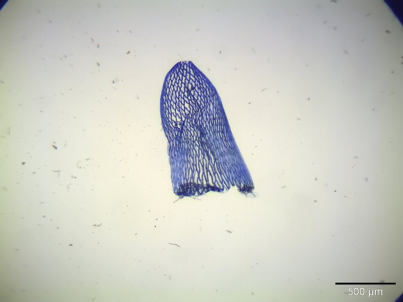 Sphagnum warnstorfii, Stammblatt, 40x